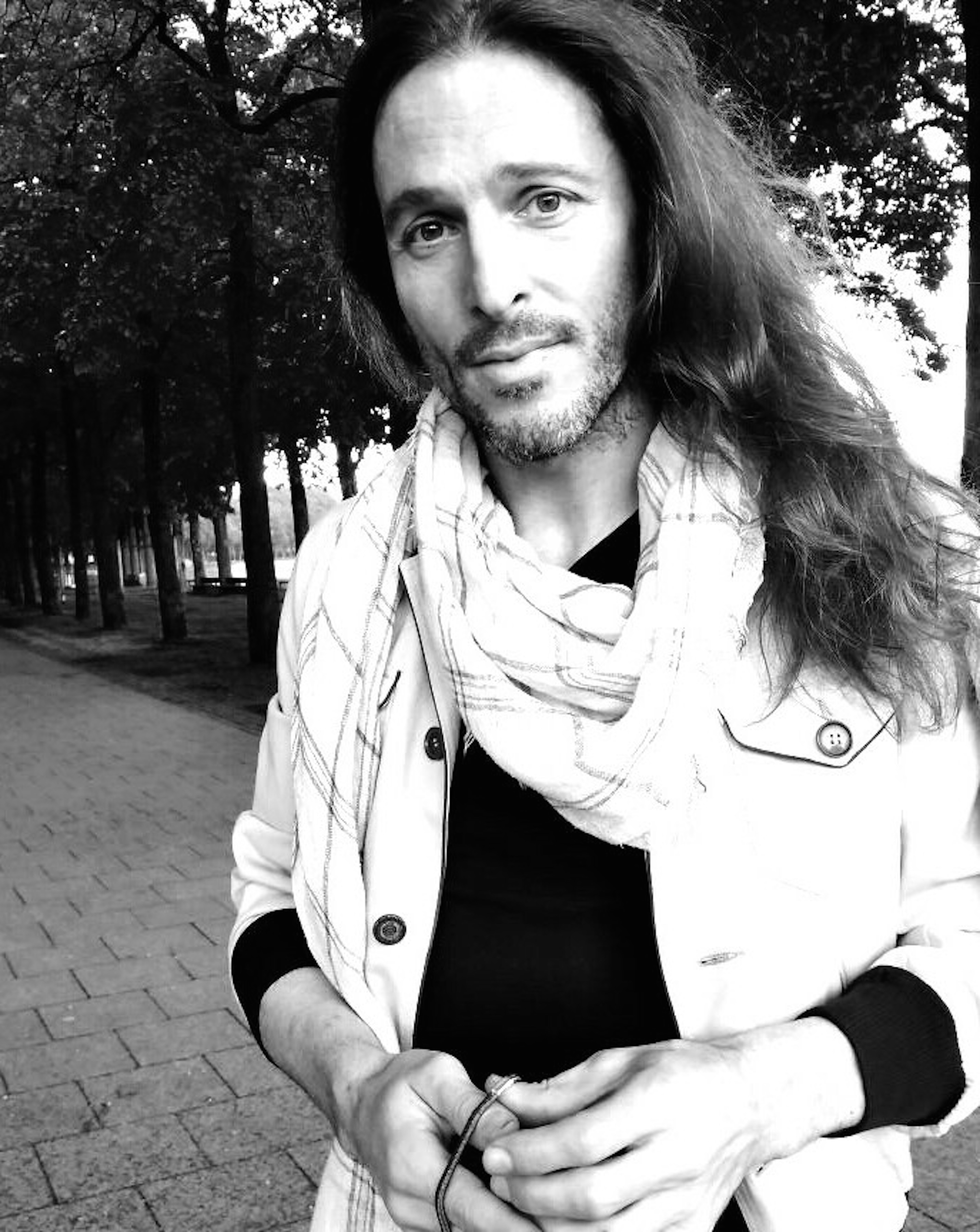 Markus Anton 2017